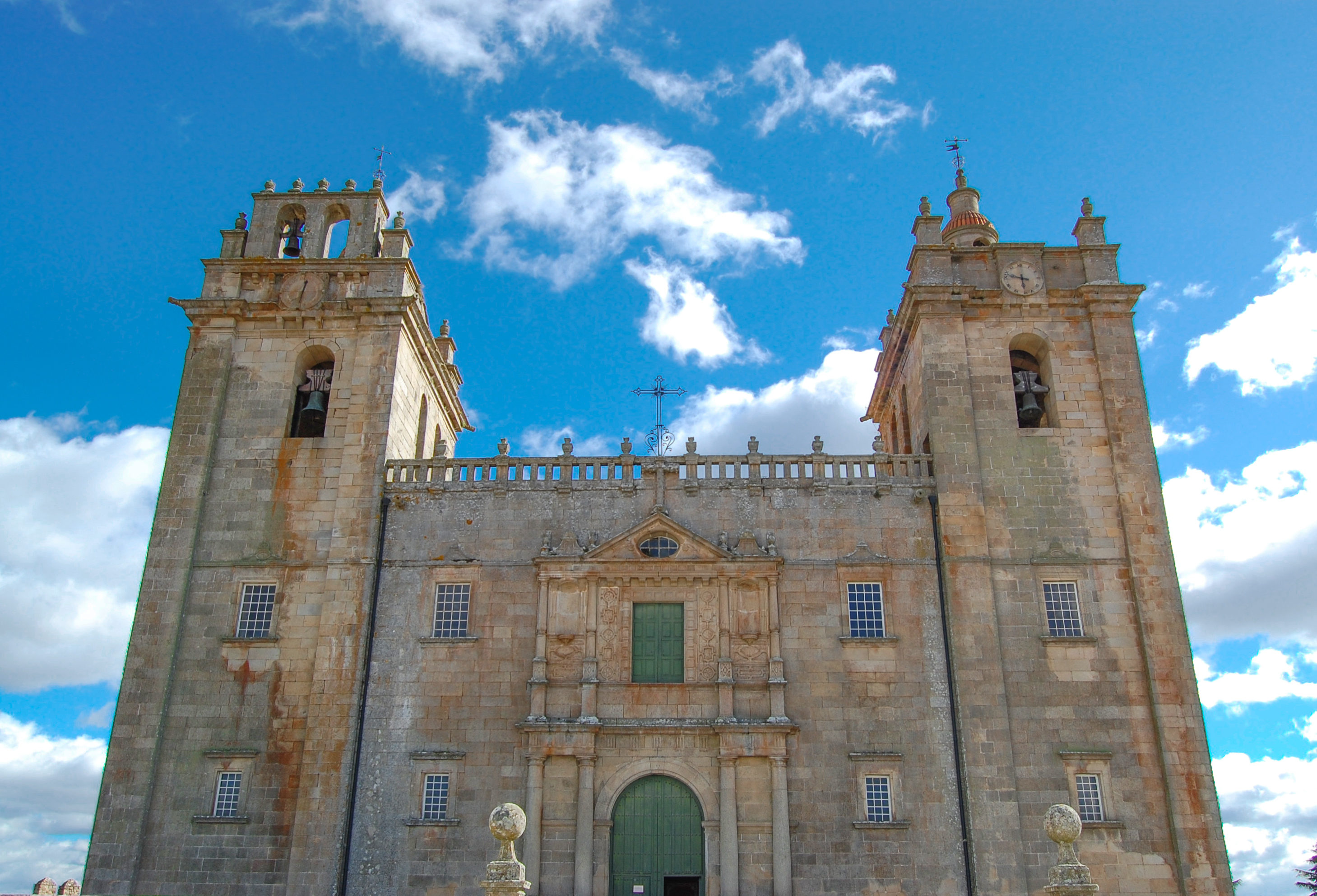 Vista frontal da Sé de Miranda do Douro